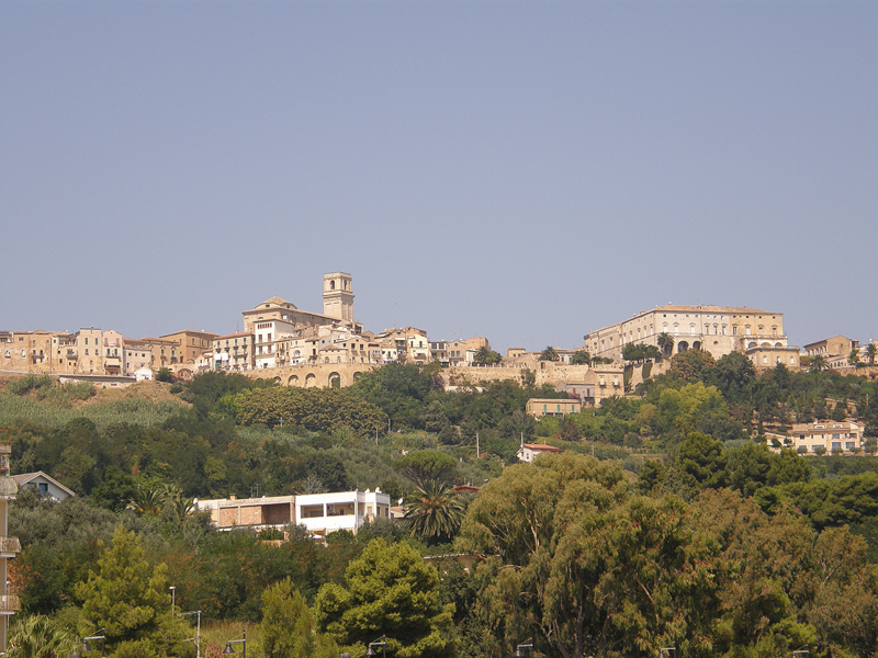 Vasto